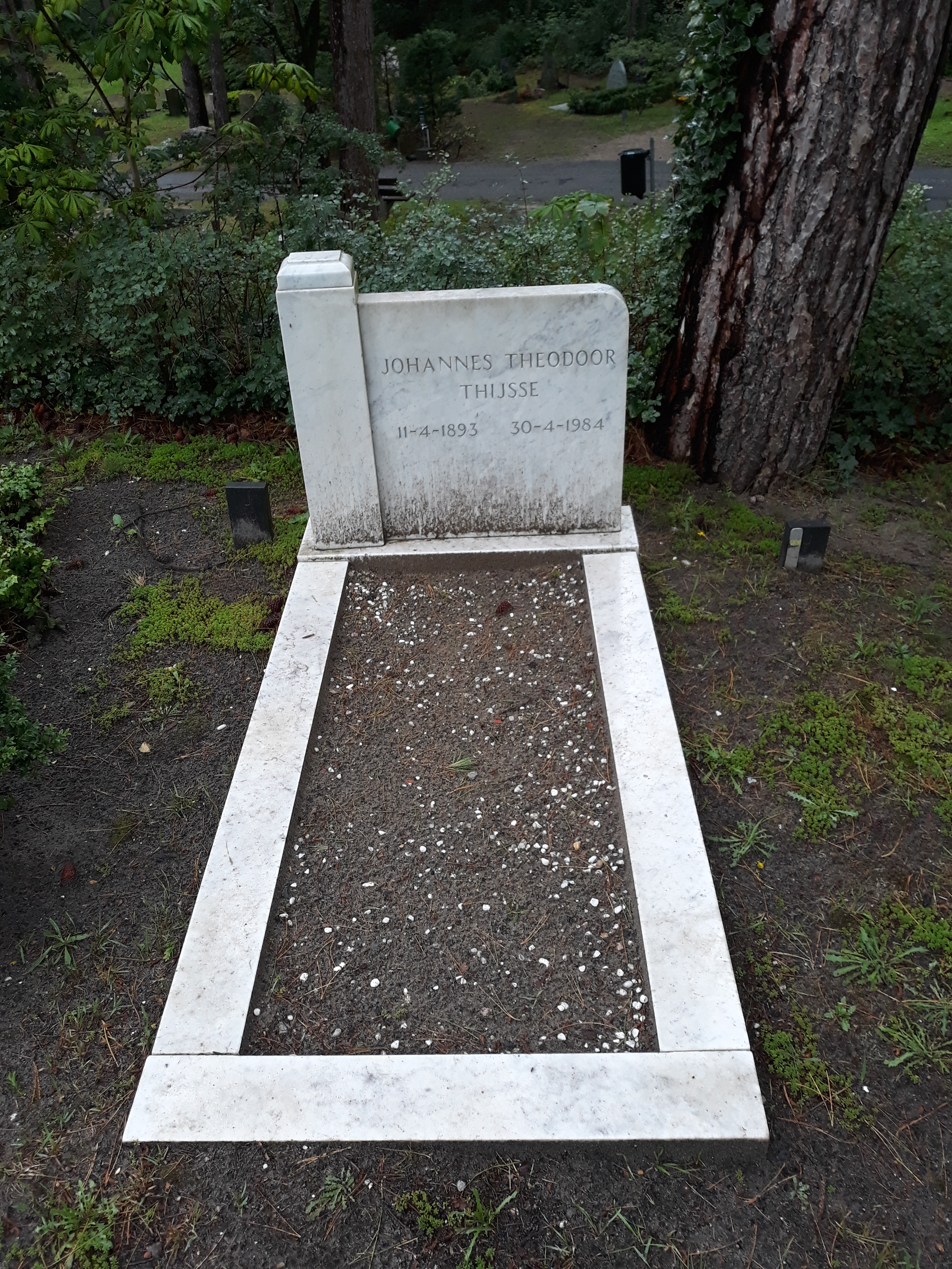 Das Grab des niederländischen Wasserbauingenieurs Johannes Theodor Thijsse auf dem Friedhov von Bloemendaal (Bergweg).